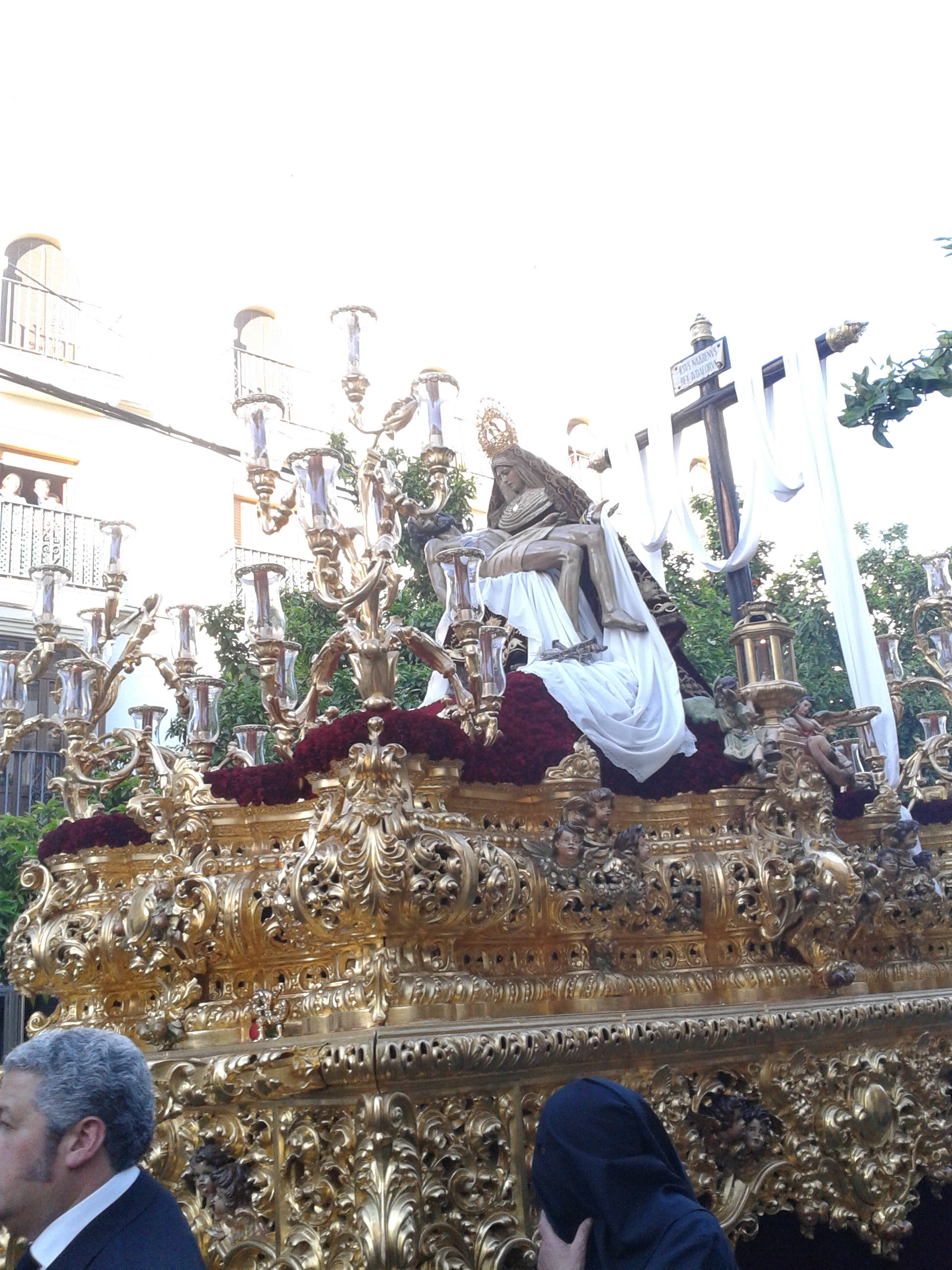 Las Angustias